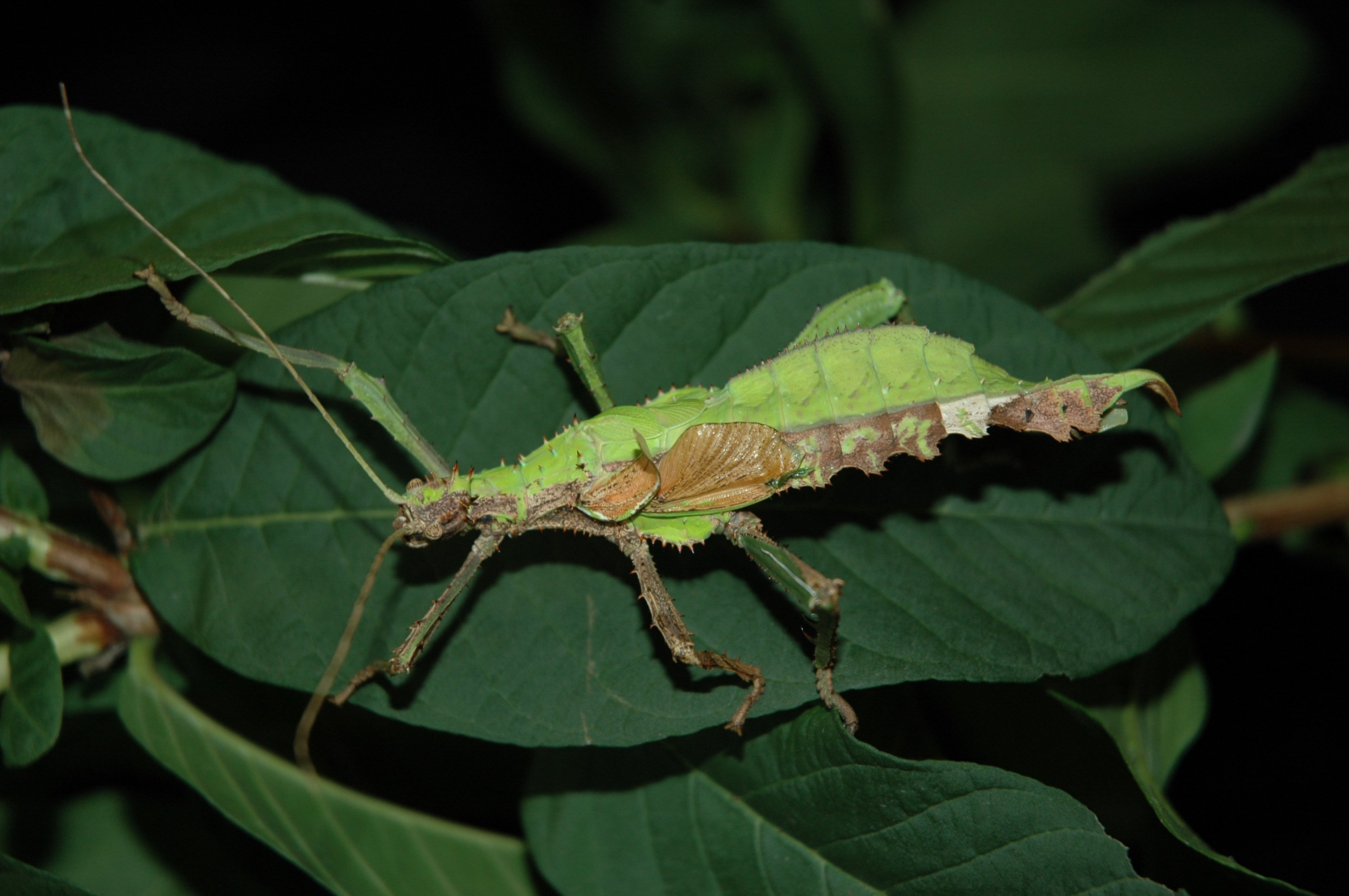 photo de phasme